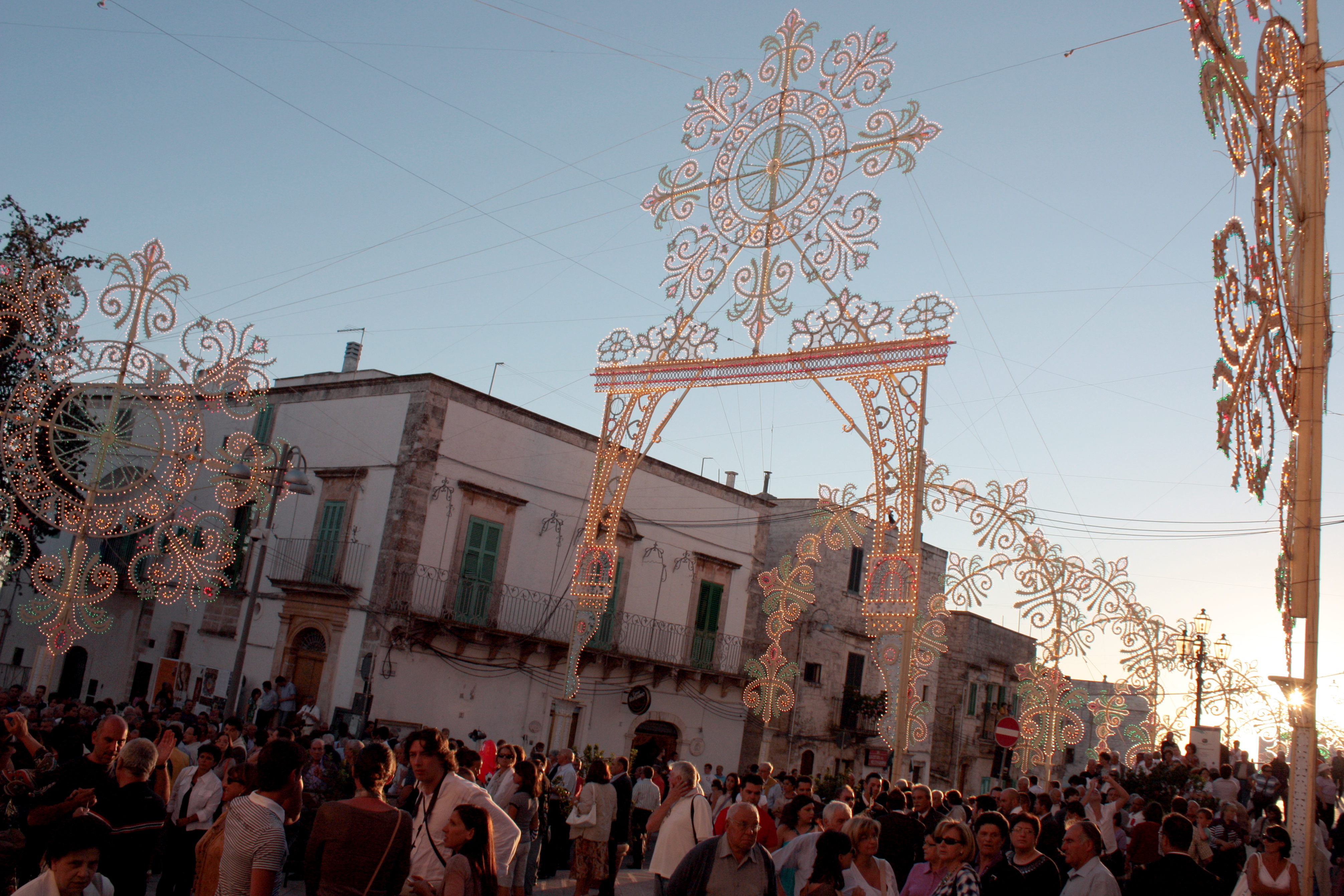 Centro Storico Cisternino, Brindisi